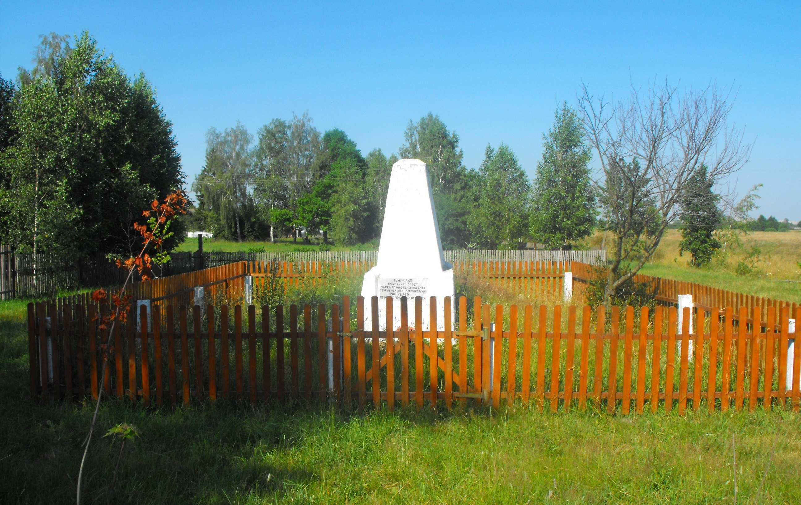 Один из двух памятников на братских могилах евреев деревни Погост Солигорского района Беларуси, убитых во время Холокоста. На табличке с надписью на русском и идише указано число убитых - 286 человек. Слева на заднем плане видна белая ограда второго памятника - 180-и убитым.